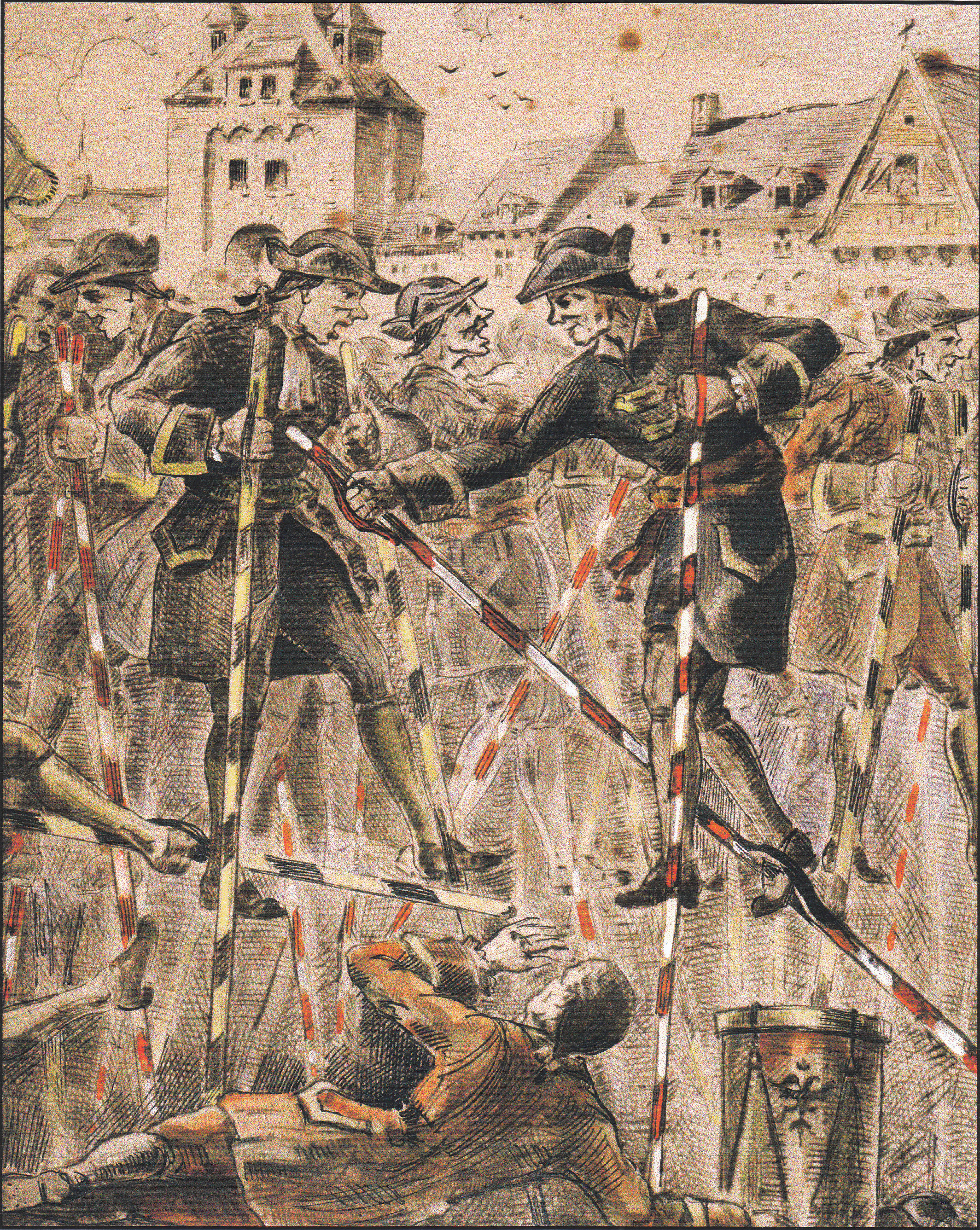 Auguste Donnay - Gravure